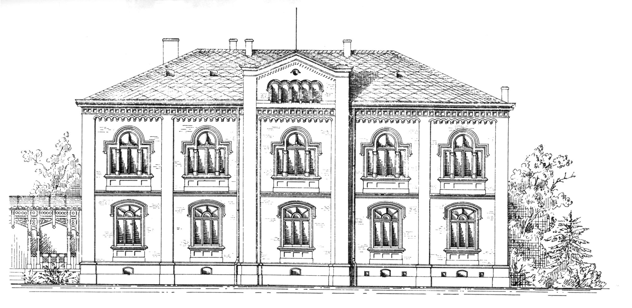 Bad Camberg, Freiherr von Schütz Schule, Hauptgebäude, Auszug Bauzeichnung, Frontansicht